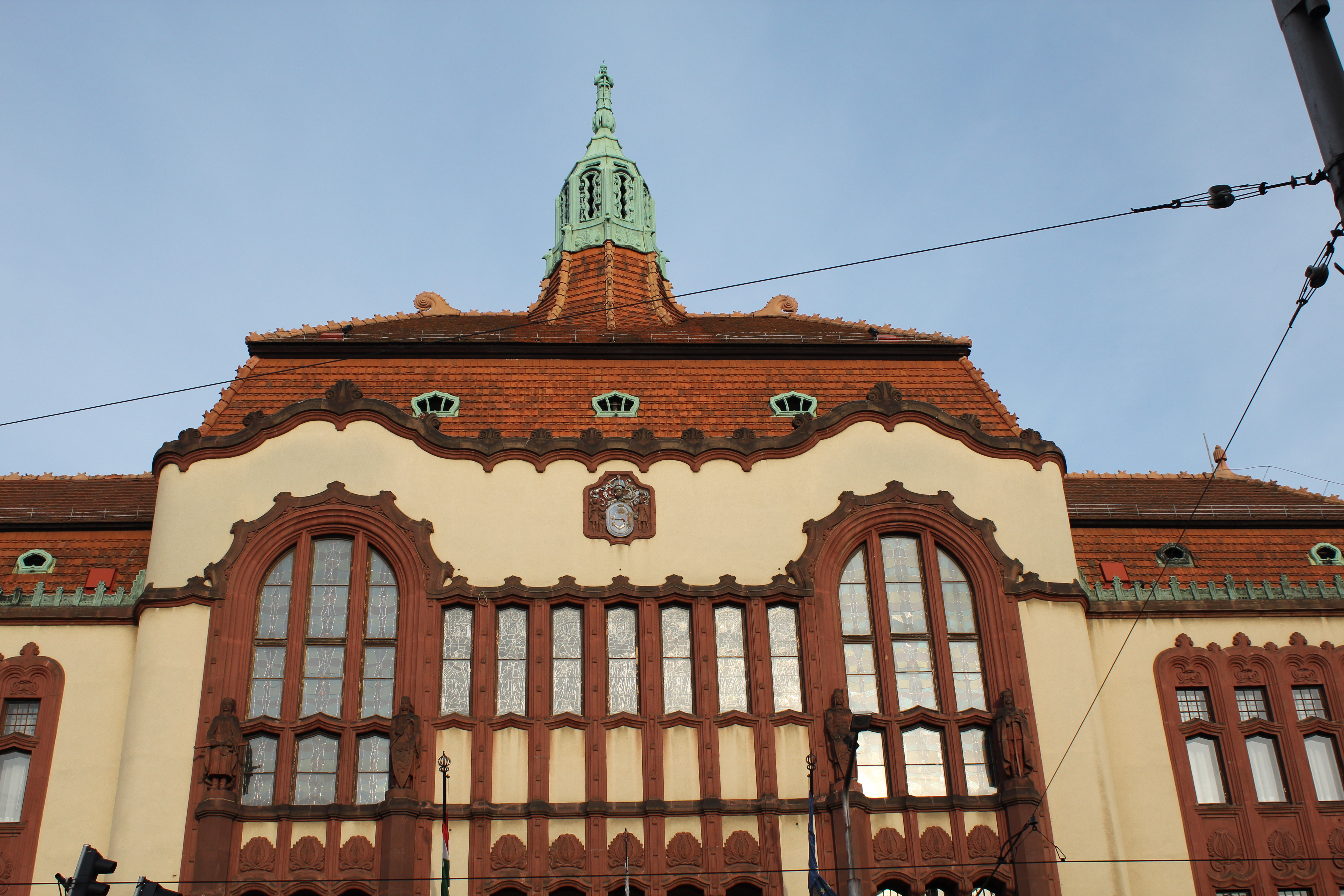 Vármegyeháza This is a photo of a monument in Hungary. Identifier: 5263